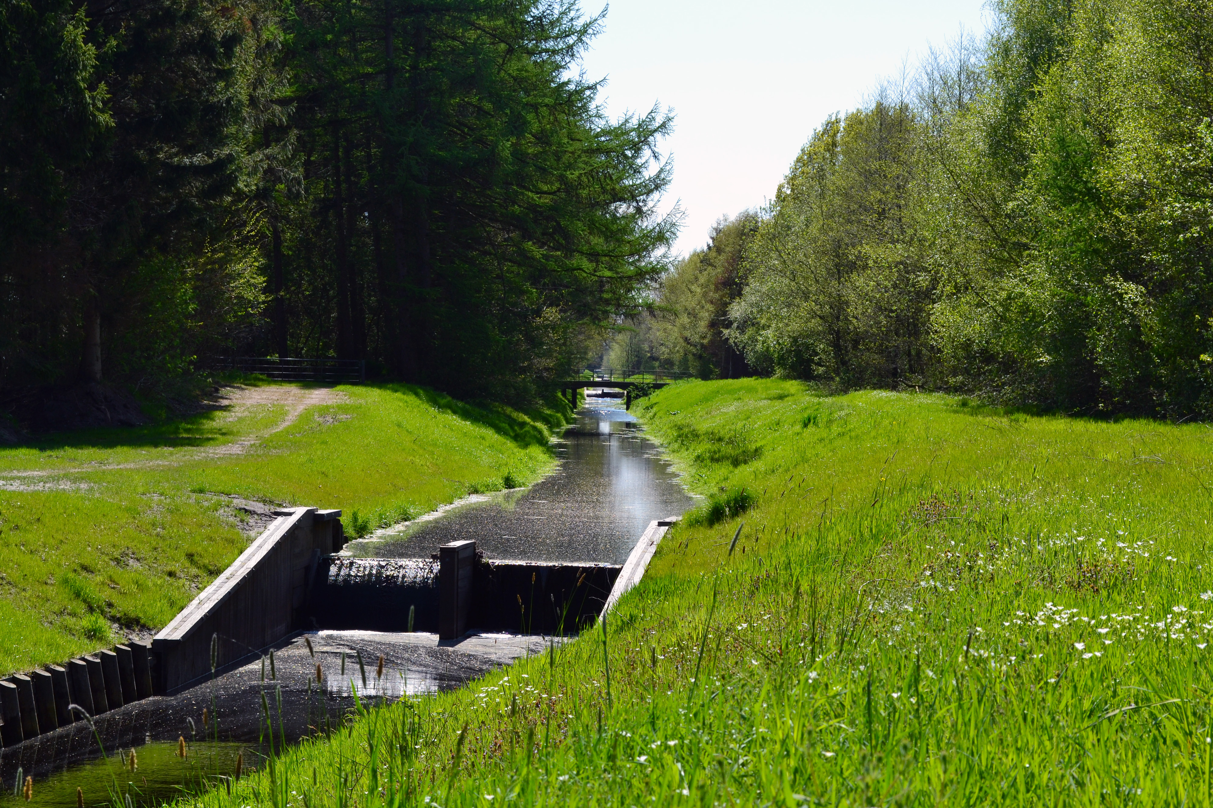 Dieses Bild zeigt den Oste-Hamme-Kanal in Spreckens flussaufwärts in Richtung Klenkendorf mit erneuertem Klappstau.